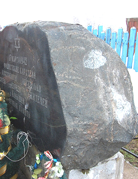 Памятник евреям, убитым нацистами в деревне Колышки Лиозненского района во время Холокоста.